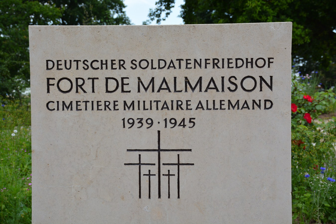 Deutscher Soldatenfriedhof Fort de Malmaison (France 2015)